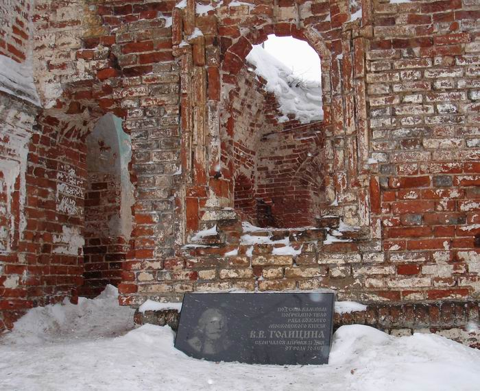 Красная гора. Пинежский район в 15 км от Пинеги